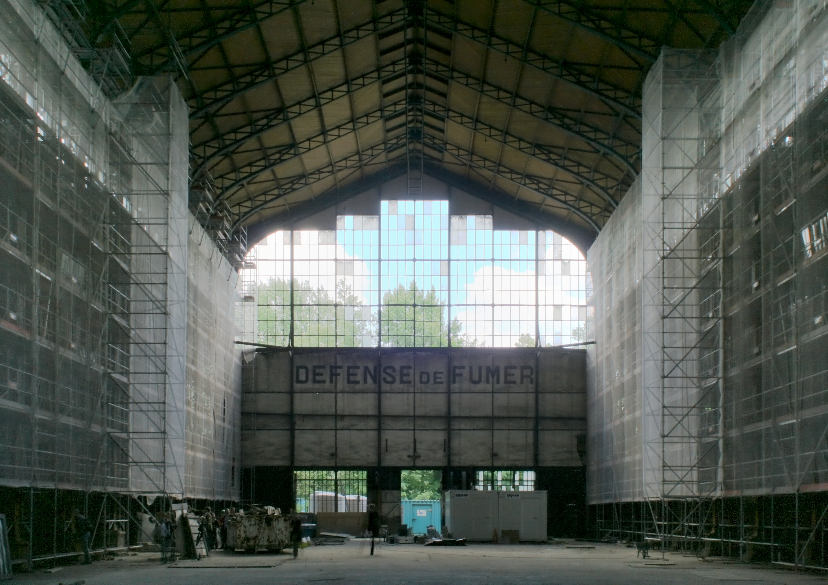 Vue de l'intérieur du hangar Y en cours de restauration. Fusion de 3 photos avec Hugin et Qtpfsgui.